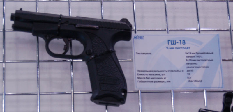 Пистолёт ГШ-18. МАКС-2009